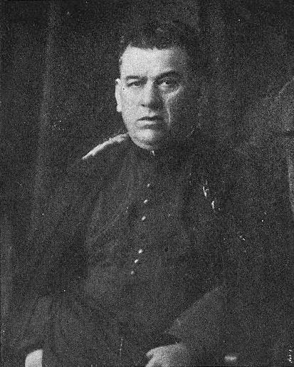 Cesáreo García Álvarez, fotografía en Vida Gallega 1935